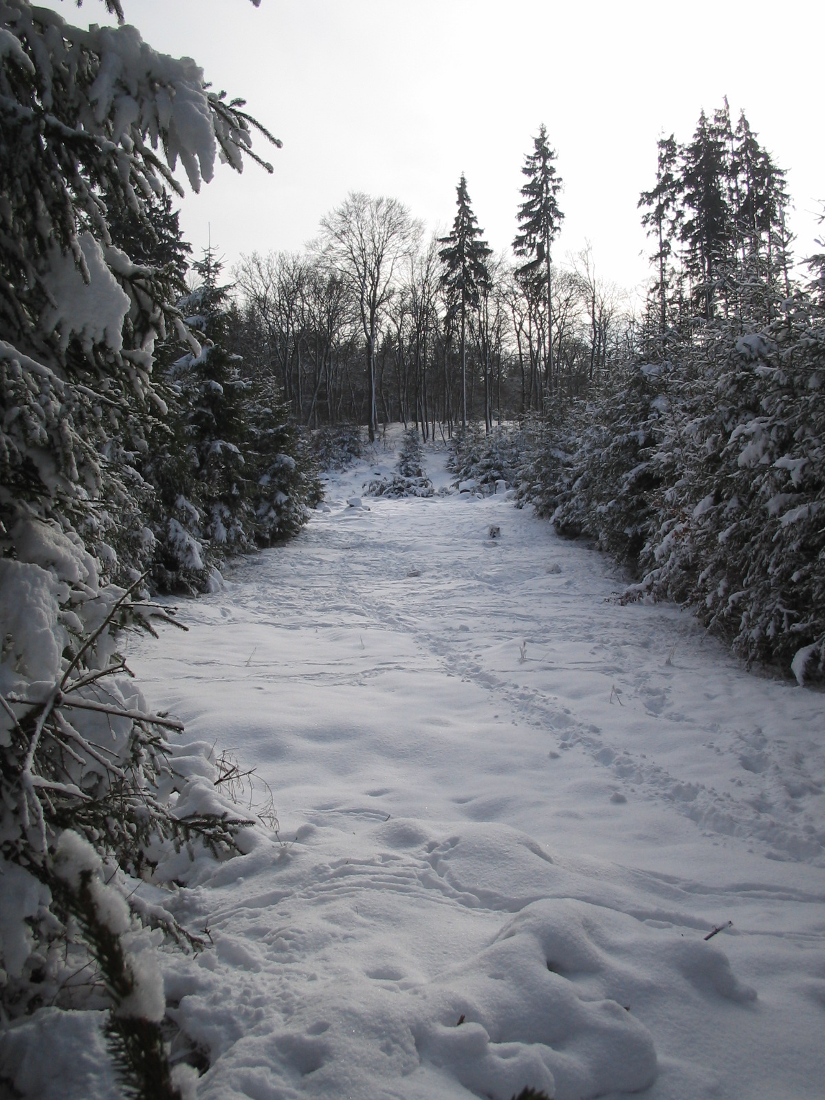 Teilansicht von Norden auf das Plateau des Suterkopfs